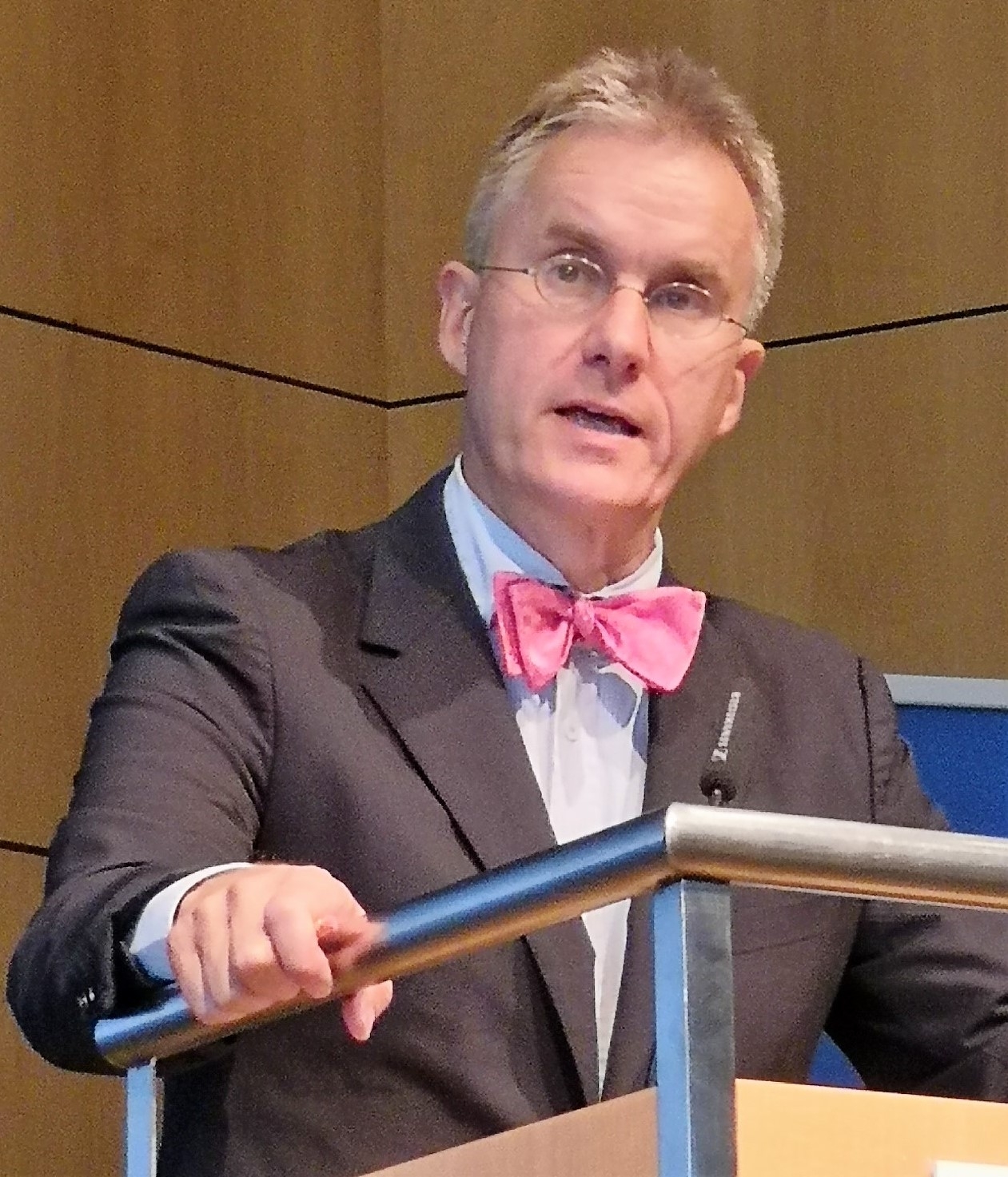 Ulrich Schlie, Historiker und Inhaber des Lehrstuhls Diplomatie II an der Andrássy Universität Budapest